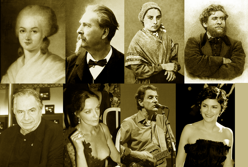 Montage à partir d'images de Commons pour illustrer l'article Occitans